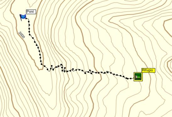 Visualizzazione grafica della salita al Rifugio Vittorio Emanuele II partendo da Pont Valsavarenche